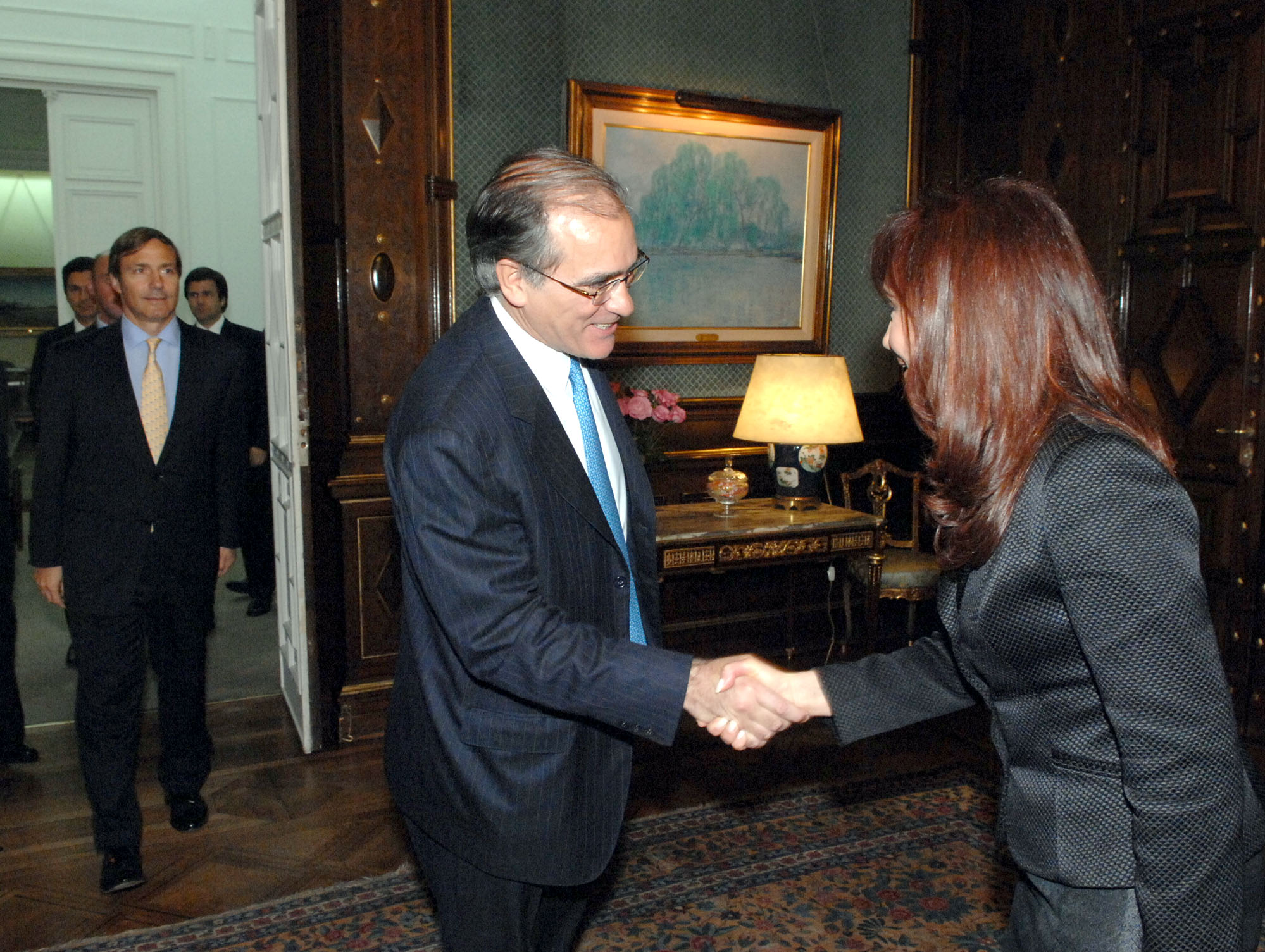 La Presidenta recibe a directivos de los bancos que elevaron propuesta de bonistas que no ingresaron al canje en 2005